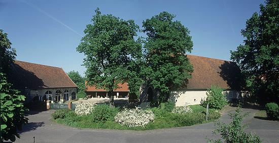 Aussenansicht des Baumberger-Sandstein-Museum